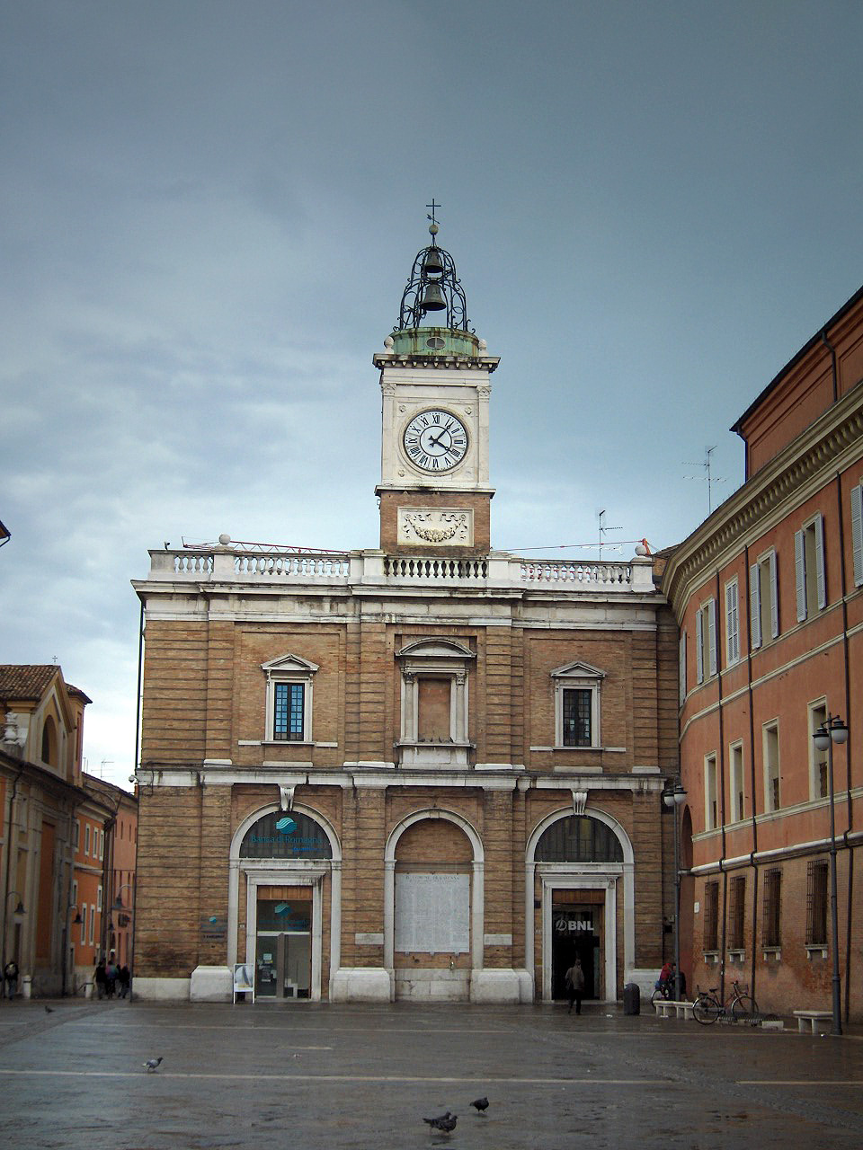 Piazza del Popolo, Ravenna, Italy